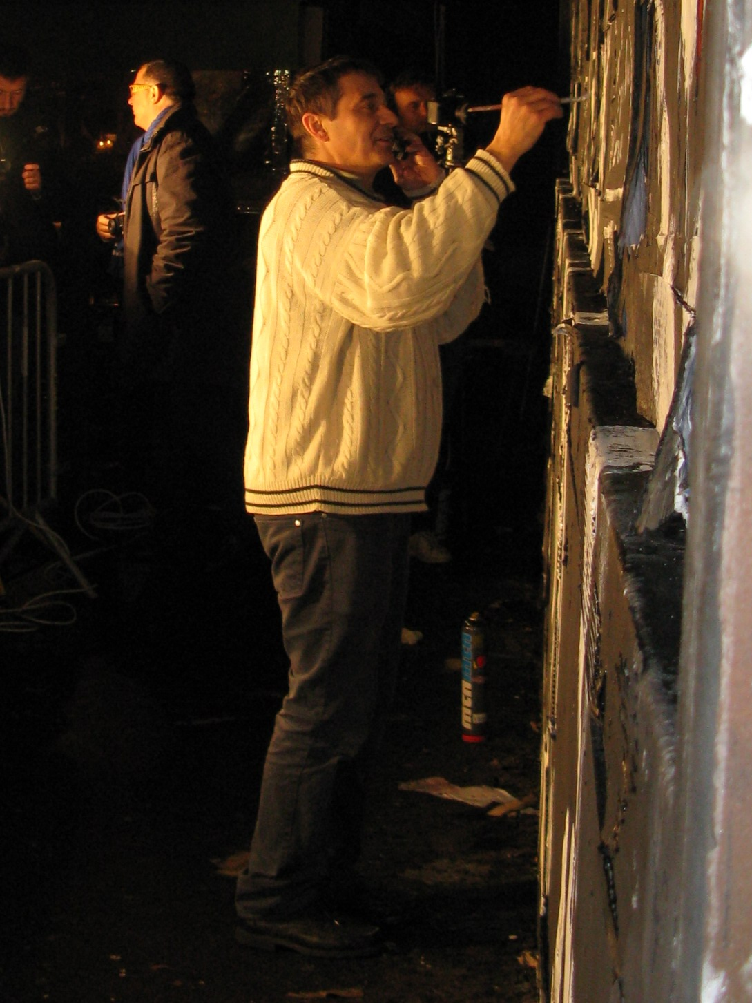 Jérôme Mesnager réalisant une fresque à Paris, rue Oberkampf le 22 janvier 2011.